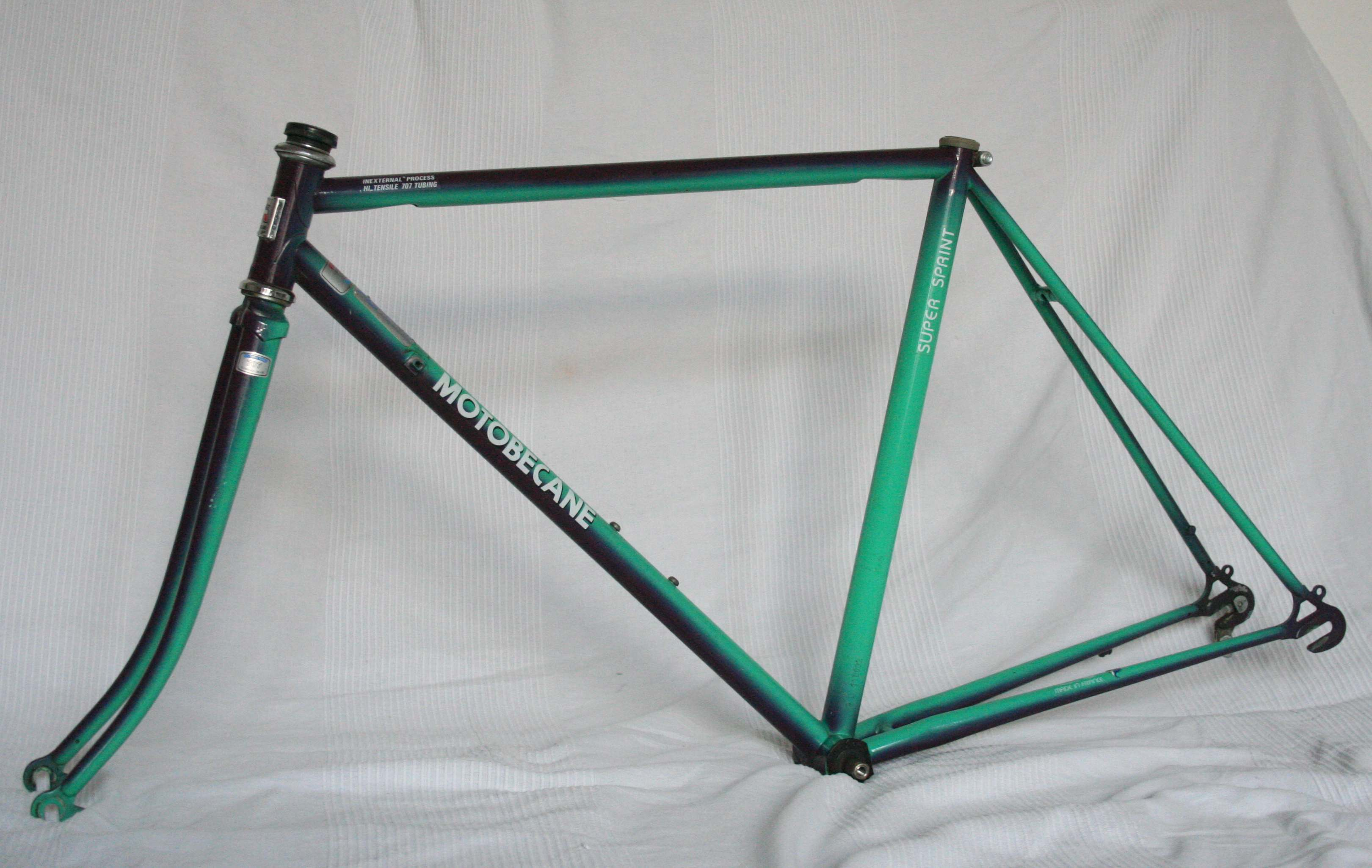 MTB Rennrad Rahmen aus Mitte der 80er